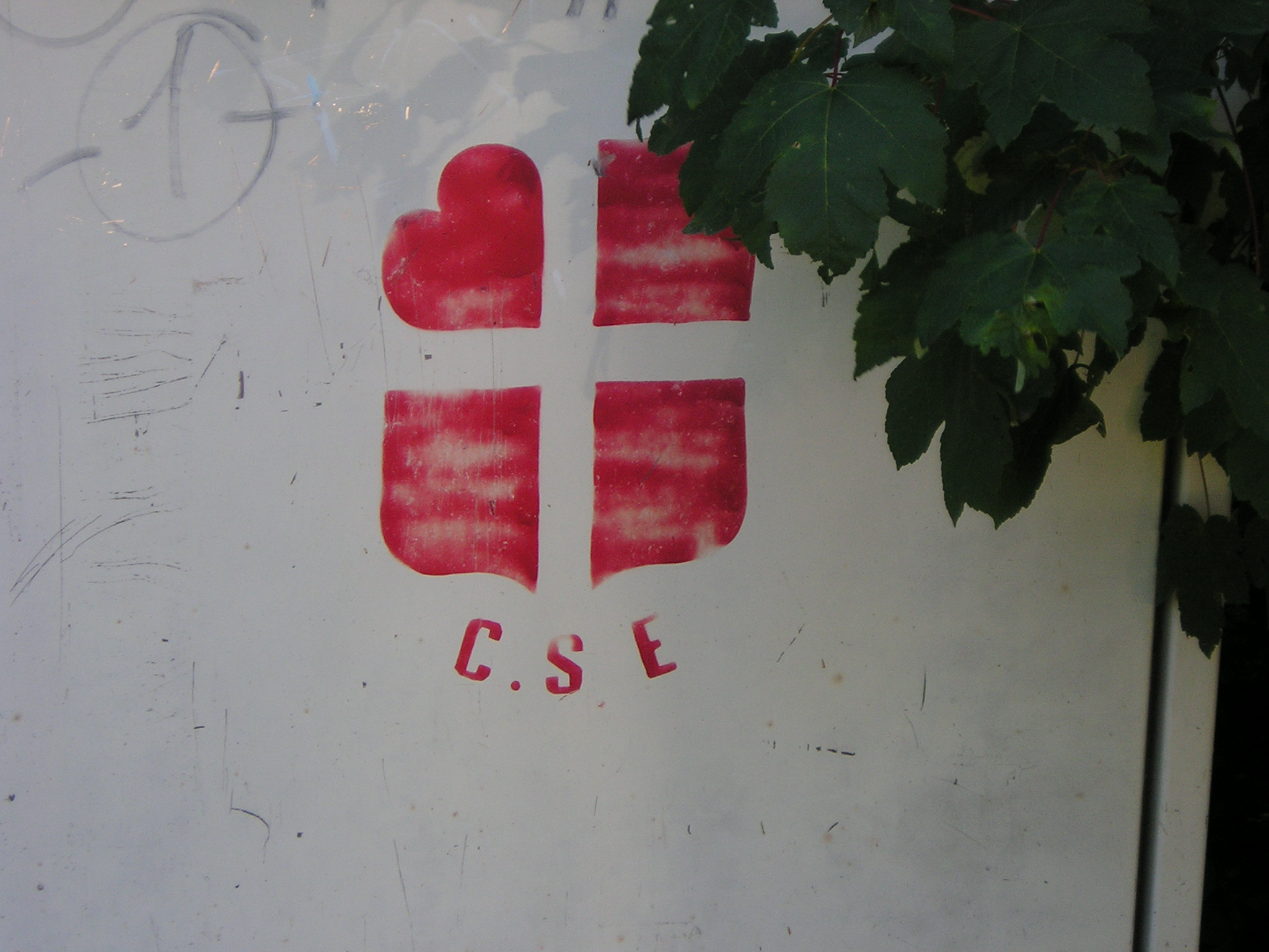 Peinture sur un transformateur d'un Logo de la Confédération savoisienne. Localisation : Doussard.